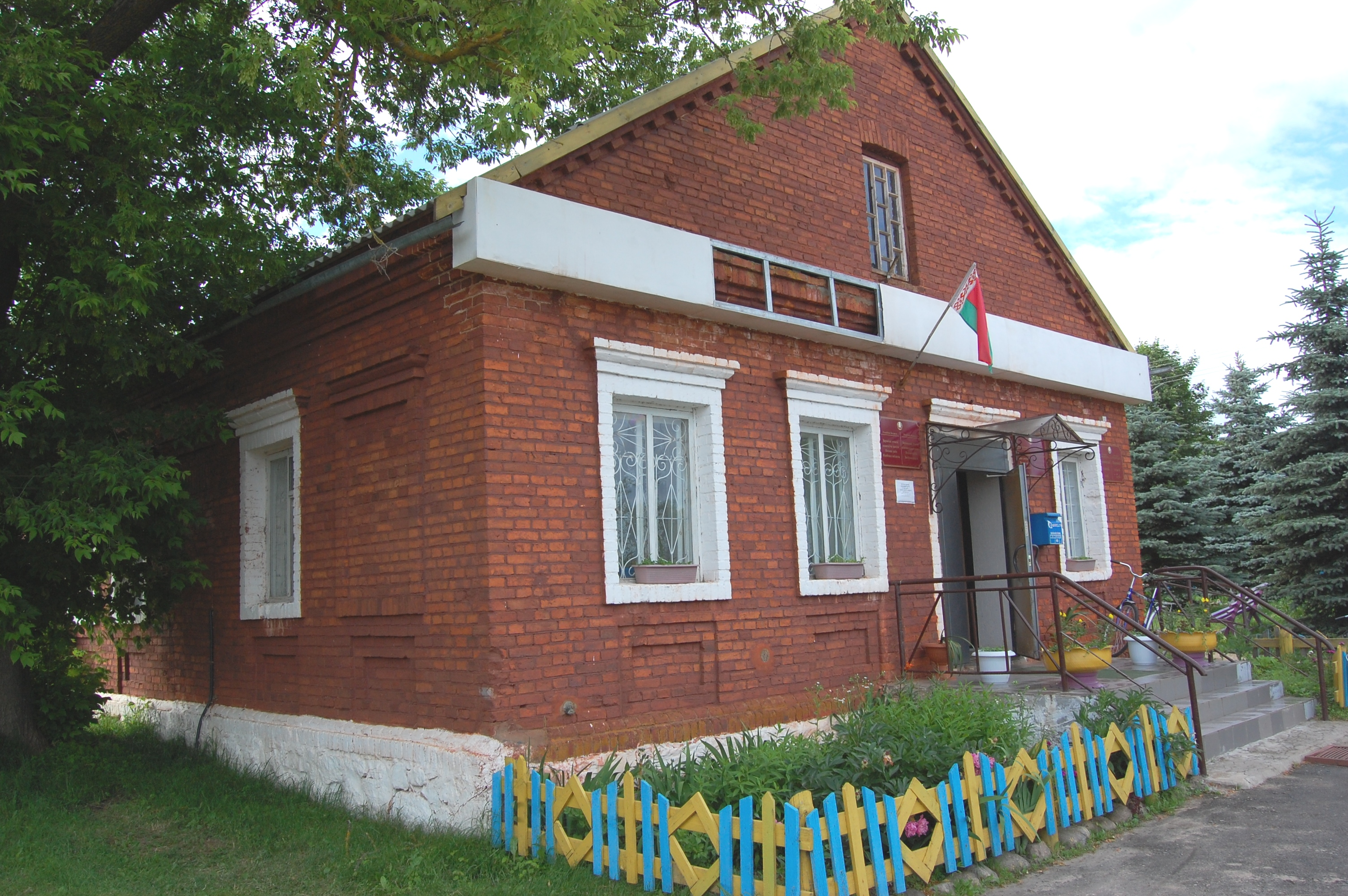 Вороничи, Полоцкий район. Сельсовет - бывшая корчма.